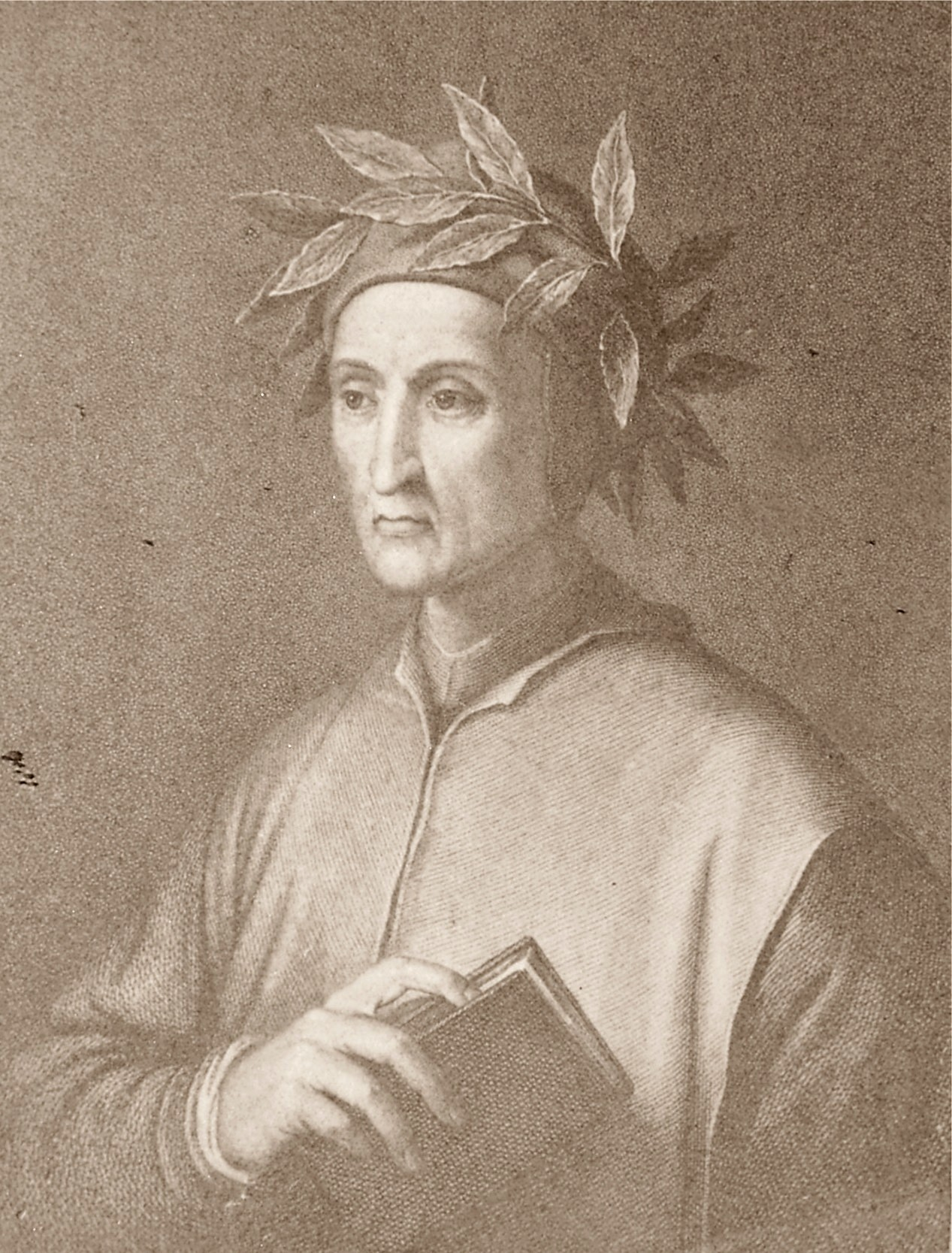 Dante Alighieri 1265-1321 italienischer Dichter und Philosoph.